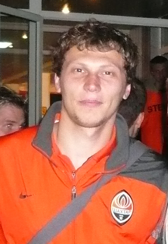 Воротар ФК «Шахтар» (Донецьк) Андрій П'ятов після півфінального матчу на Кубок УЄФА проти київського «Динамо»